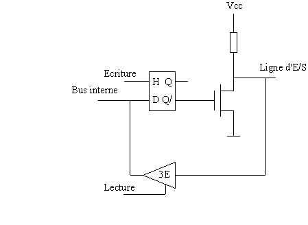 Structure d'une ligne de port d'E/S d'un microprocesseur 8051 Créé par Lucien Duval 12 janvier 2006 à 18:18 (CET) §Licensing Catégorie:Schémas d'électronique